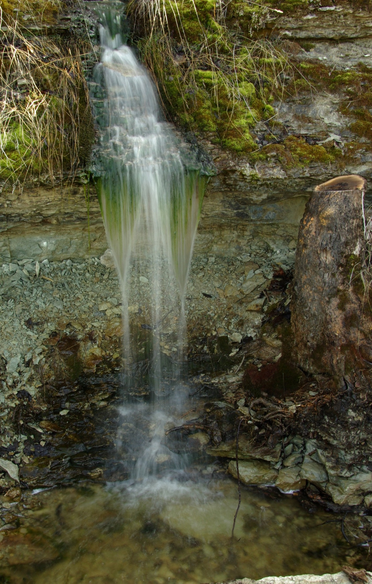 asub Harju maakonnas Padise vallas Madise külas Harju-Madise kiriku lähedal